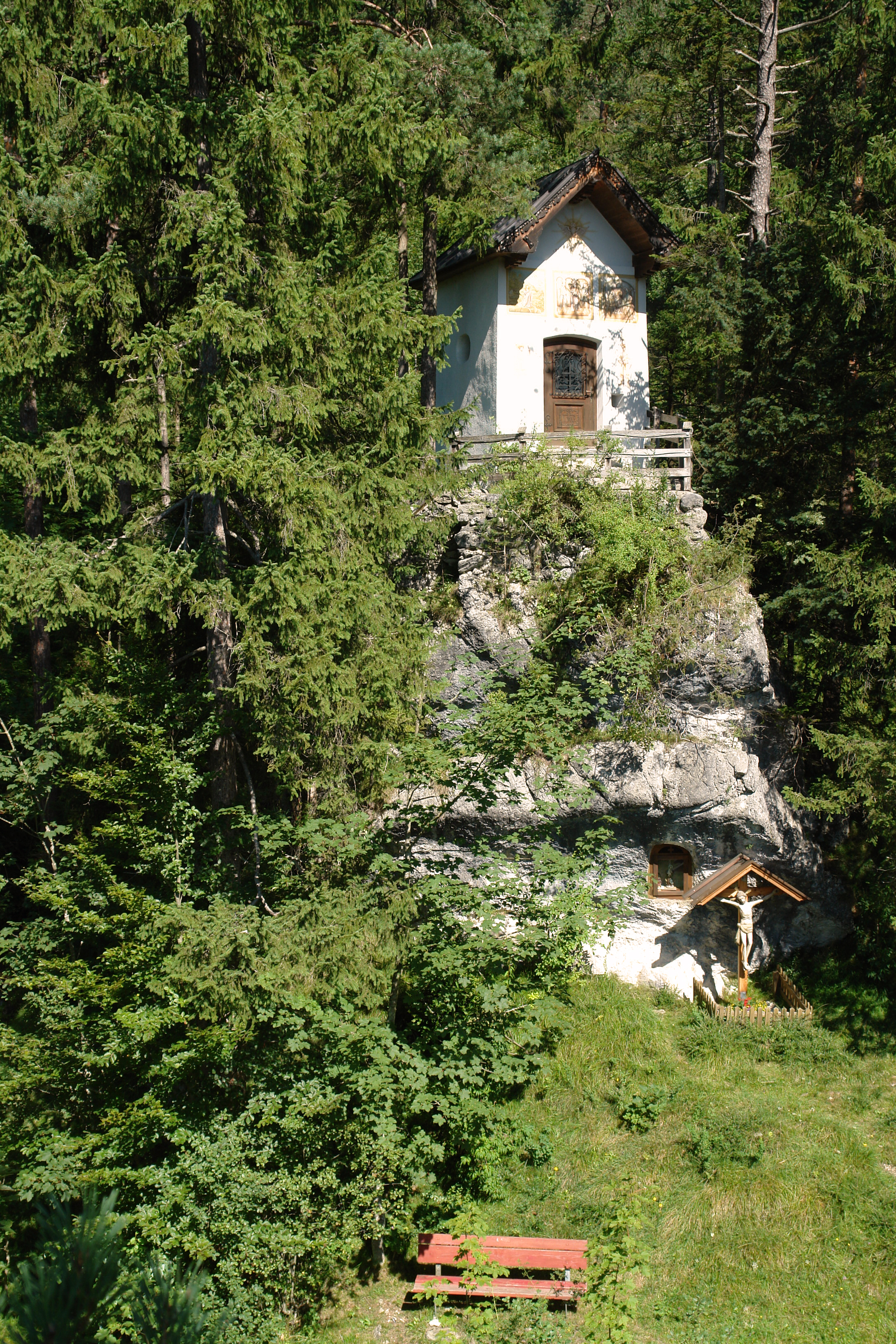 Steinkapelle in Embach, Gemeinde Angerberg, Tirol This media shows the remarkable cultural object in the Austrian state of Tyrol listed by the Tyrolean Art Cadastre with the ID 2227.